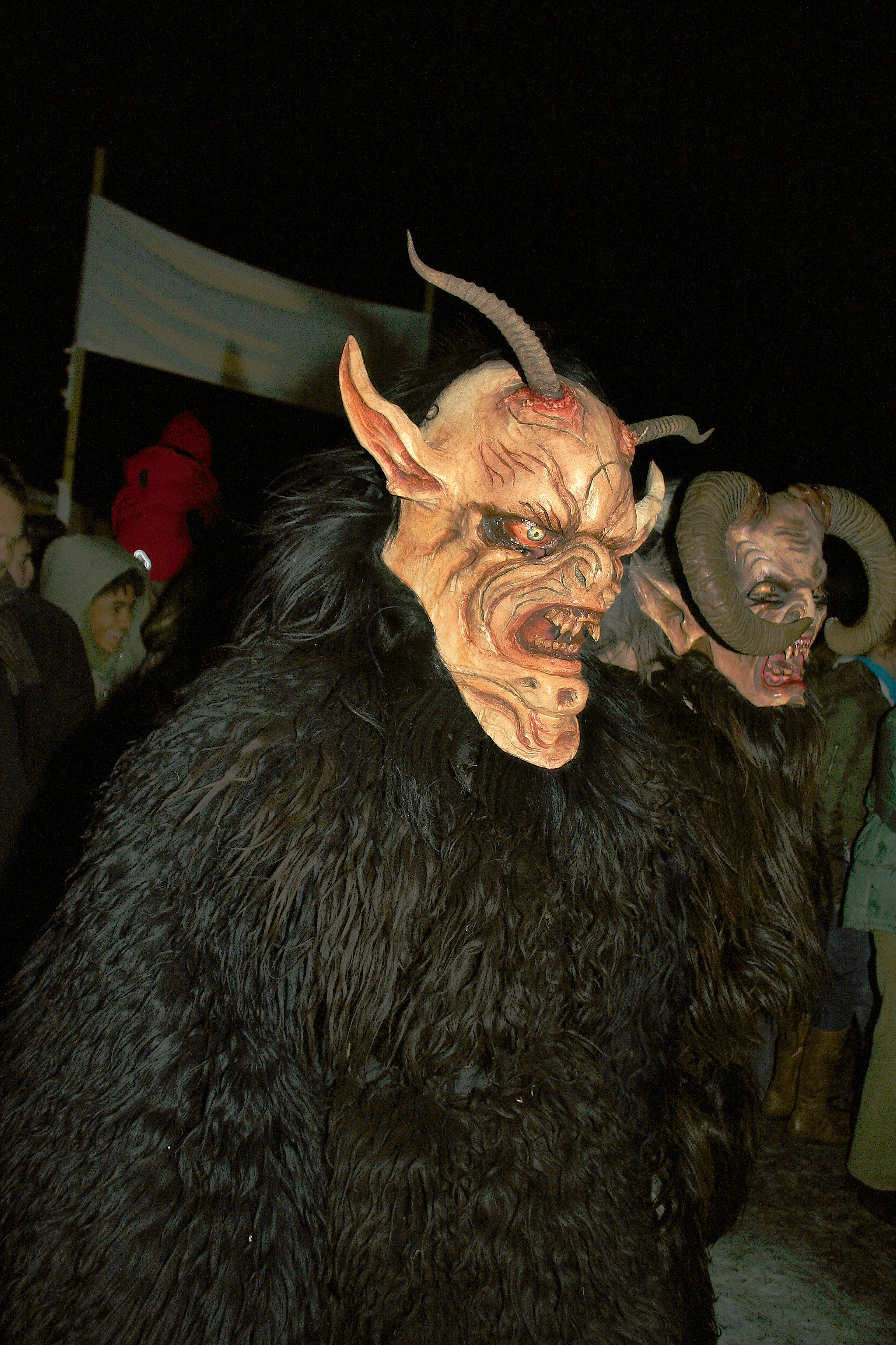 Krampus of Morzger Pass in Salzburg Austria